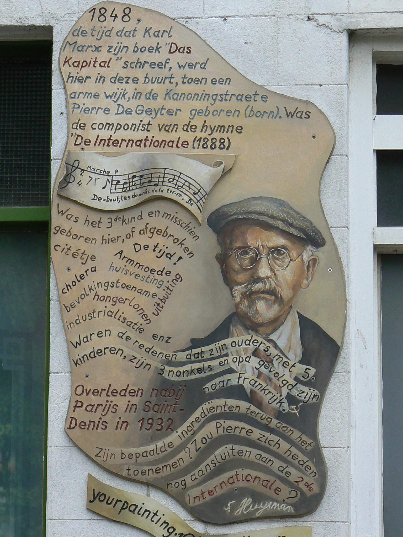 Pierre De Geyter. Componist van "De Internationale"